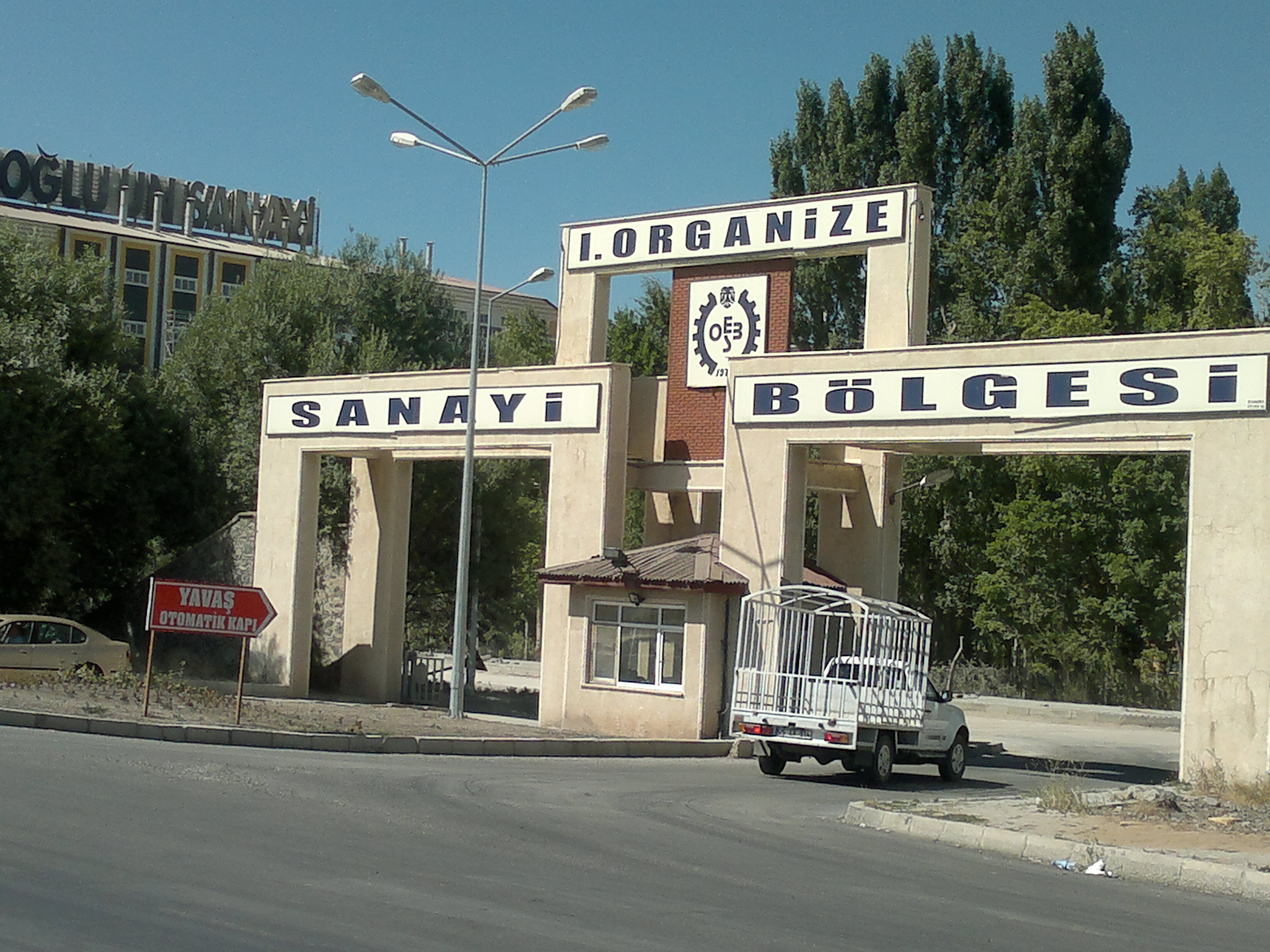 Aziziye Organize Sanayi